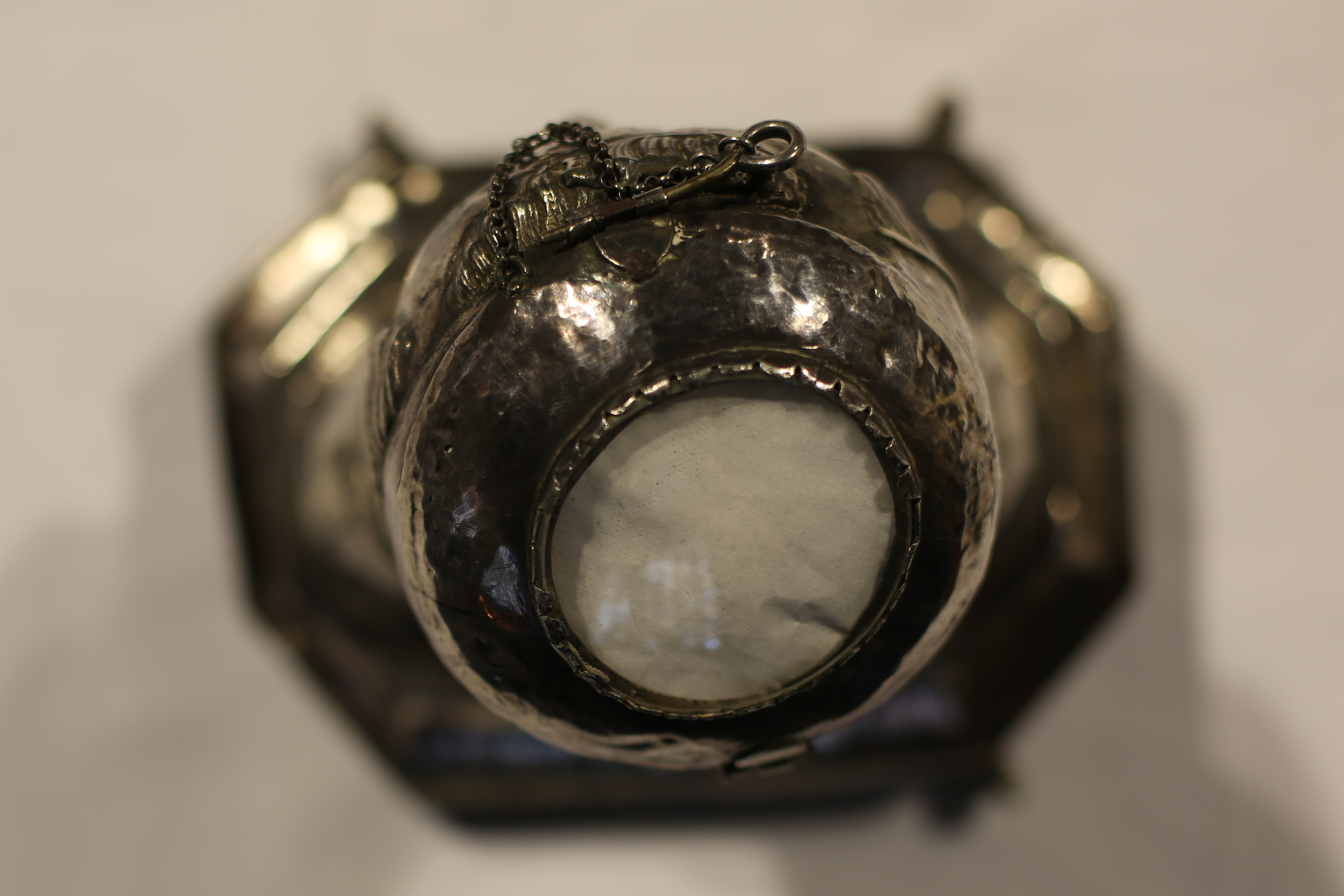 Buste reliquaire de saint Mériadec, , faisant partie du trésor de Saint-Jean-du-Doigt